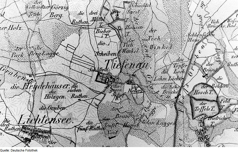 Original image description from the Deutsche Fotothek Wülknitz-Tiefenau. Oberreit, Sect. Oschatz, 1839/40